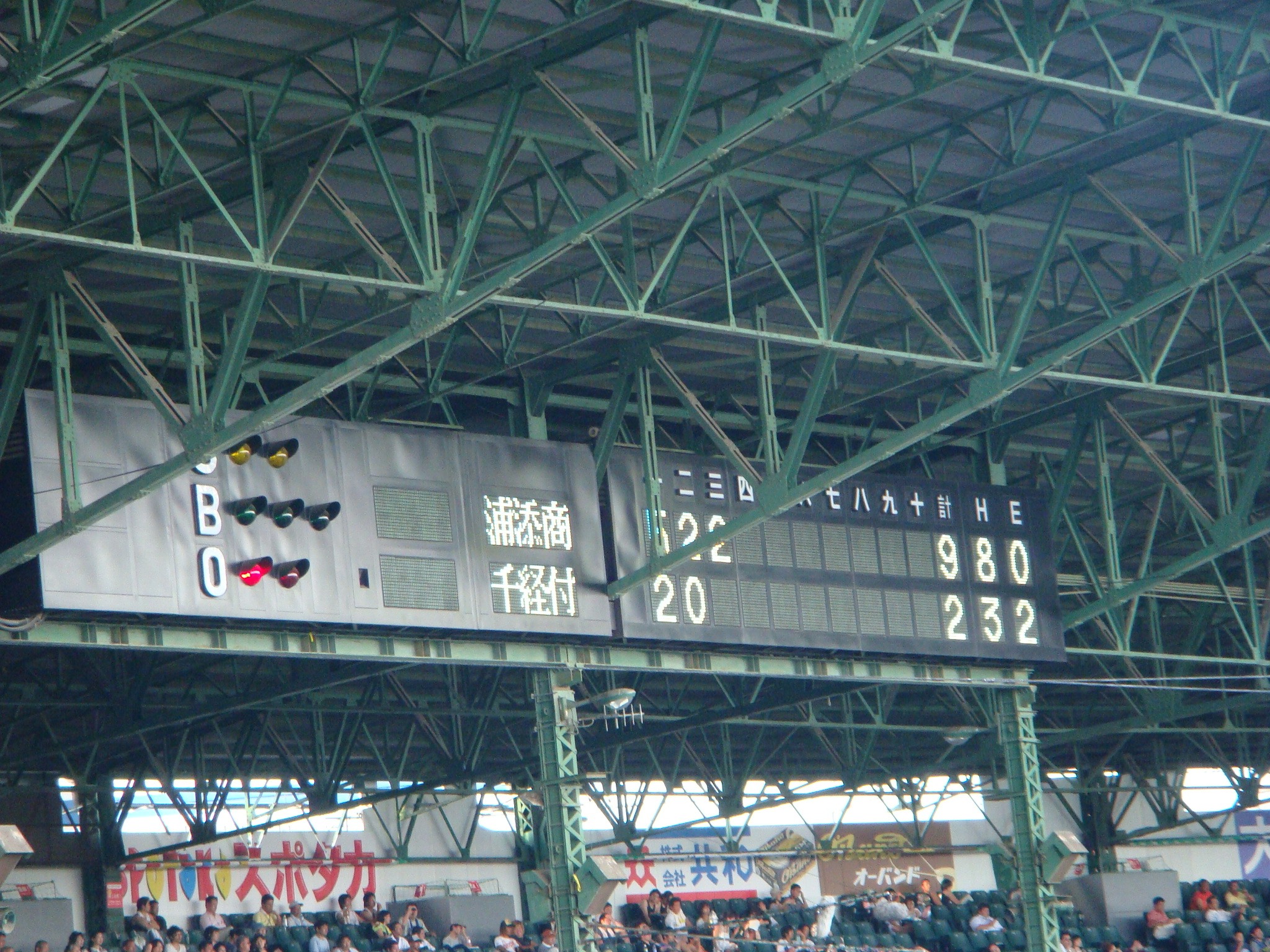 Koshien Stadium